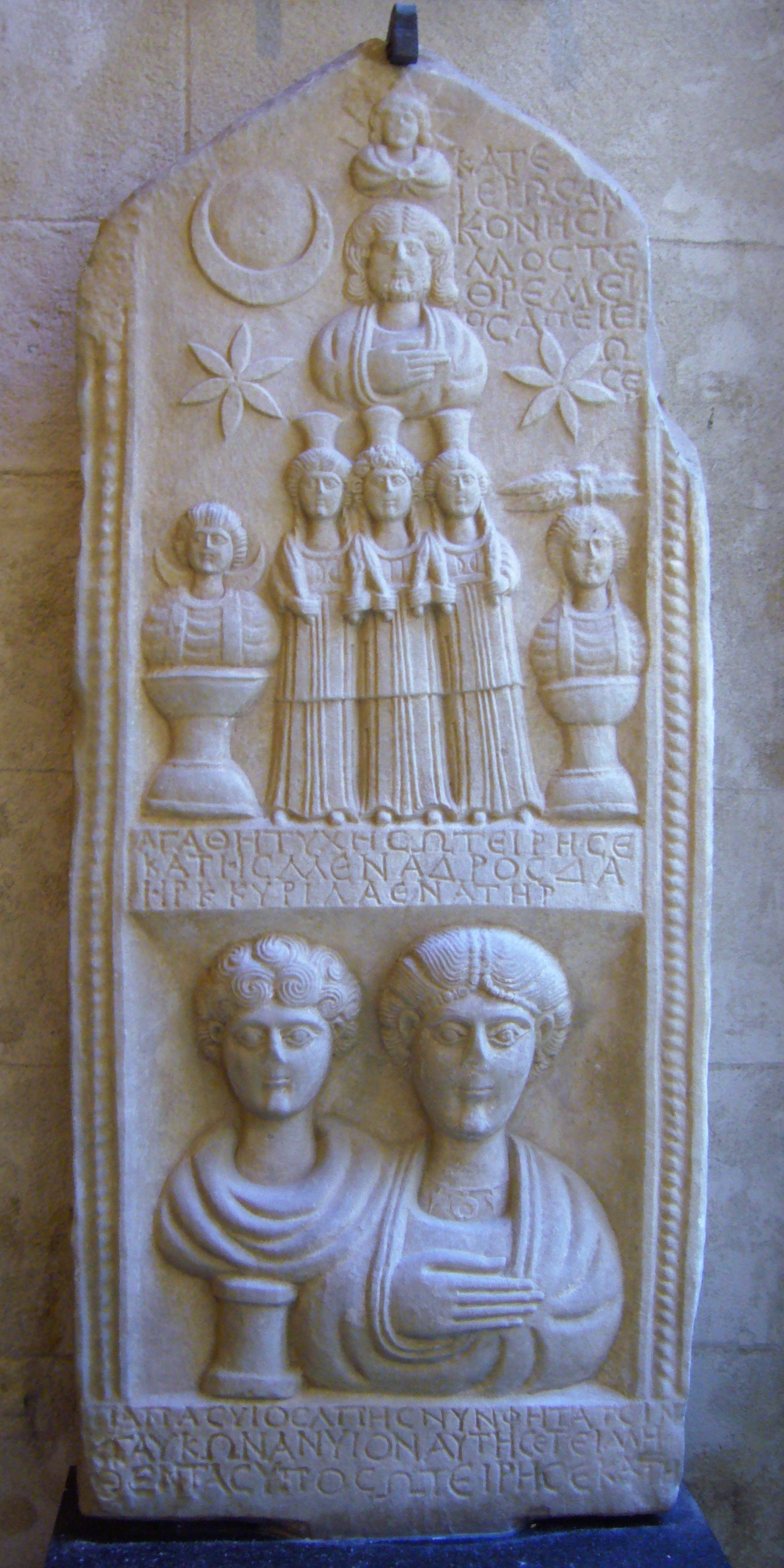 Stèle funéraire de Glykon et de son fils Tateis (3e siècle a. Ch. n.) au Musée Lapidaire en Avignon. [1]